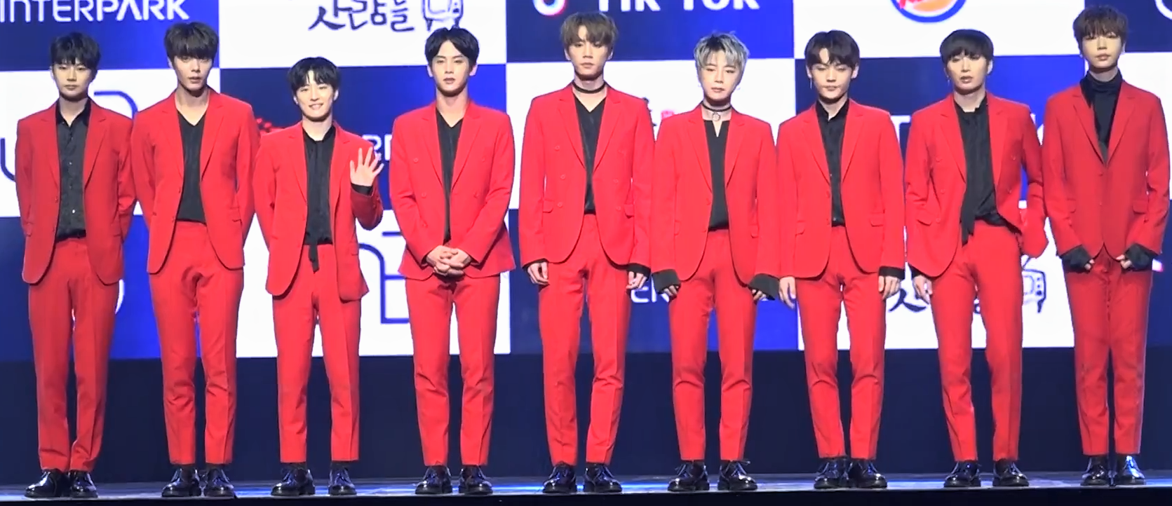 180303 유앤비 팬미팅